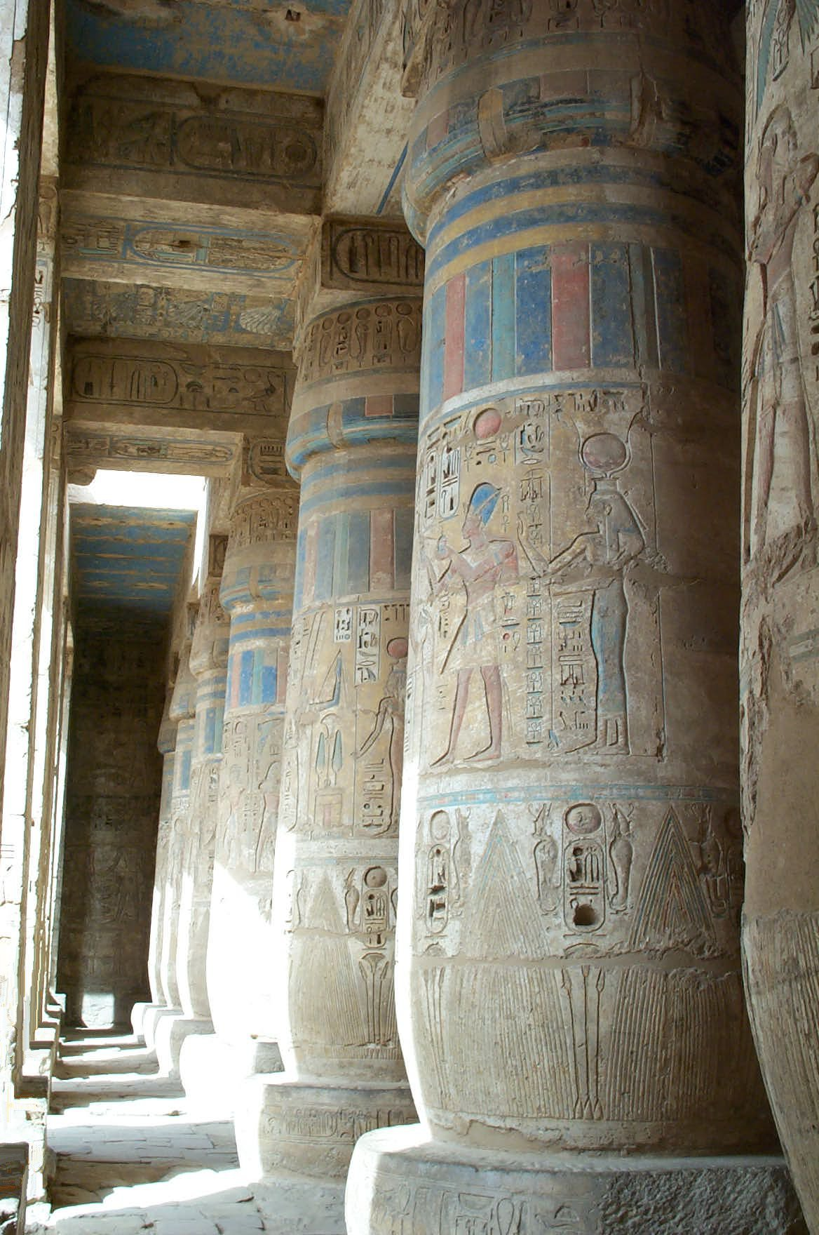 Az eredeti színek az oszlopokon (Medinet Habu)